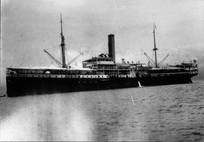 Foto. Het schip de "Imhoff " ligt op de rede van Donggala.